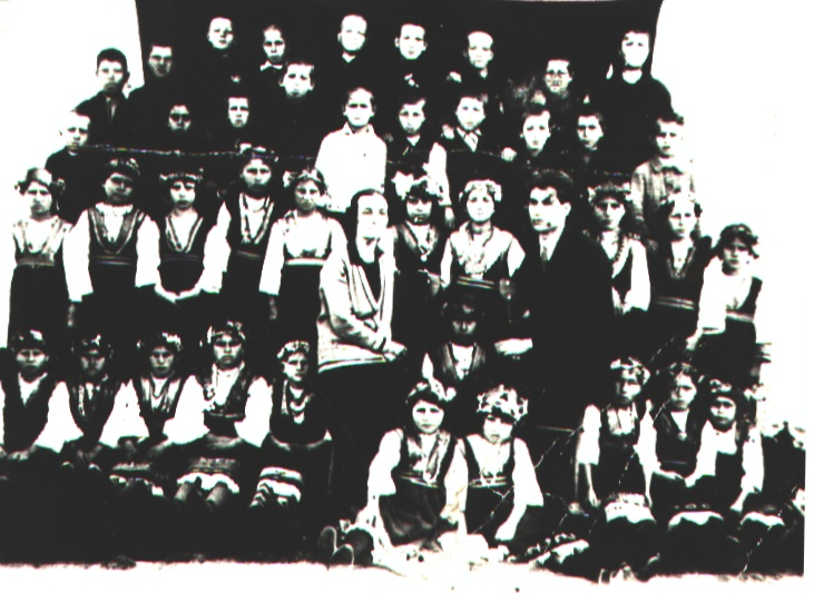 Ученици от Рани луг между 30те и 40 те години на XX век